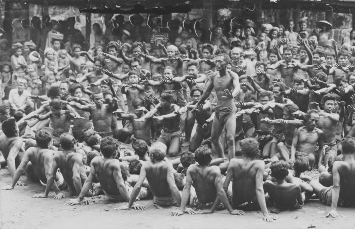 foto. De Kecak dans, in Europa bekend als de apendans, is de bekendste dans waarin Hanuman een grote rol speelt. Deze dans vindt zijn oorsprong in de Sanghyang uitvoering, een rituele dans waarbij de dansers in een trance raken door zang en oproeping. Eenmaal in trance, dan is de Sanghyang als geest in het lichaam van de danser. De geest manipuleert die persoon en gebruikt hem om het maskerspel, het poppenspel of de dans uit te voeren. De bewegingen, gebaren en choreografie zijn erg stilistisch en aan rituelen gebonden. De Kecak-groep bestaat uit mannen, gekleed in zwart-wit geblokte lendendoeken. Kenmerkend is het zingen van de klank 'tjak' in verschillende ritmes en tempo's door elkaar. Alleen de vocale klanken worden gebruikt als muziek. De groep zit in een cirkel en maakt met handen en armen deinende bewegingen. Rond de jaren '20 van de 20e eeuw vonden er veranderingen plaats. Het Ramayana werd toegevoegd aan de traditionele Kecak dans. Vanaf het moment dat het Ramayana met Kecak samenkwam was er een speciale rol voor Hanuman in de dans. Deze wordt vanaf dan ook wel 'de apendans' genoemd, omdat de zangers het apenleger van Hanuman worden tijdens de opvoering. De zangers vormen een cirkel, met in het midden de personages van de Ramayana, die rijkelijk uitgedost zijn is kostuums en maskers. Deze vorm van Kecak is vandaag de dag nog erg populair, maar wordt vooral opgevoerd voor toeristen. . De kecak of apendans